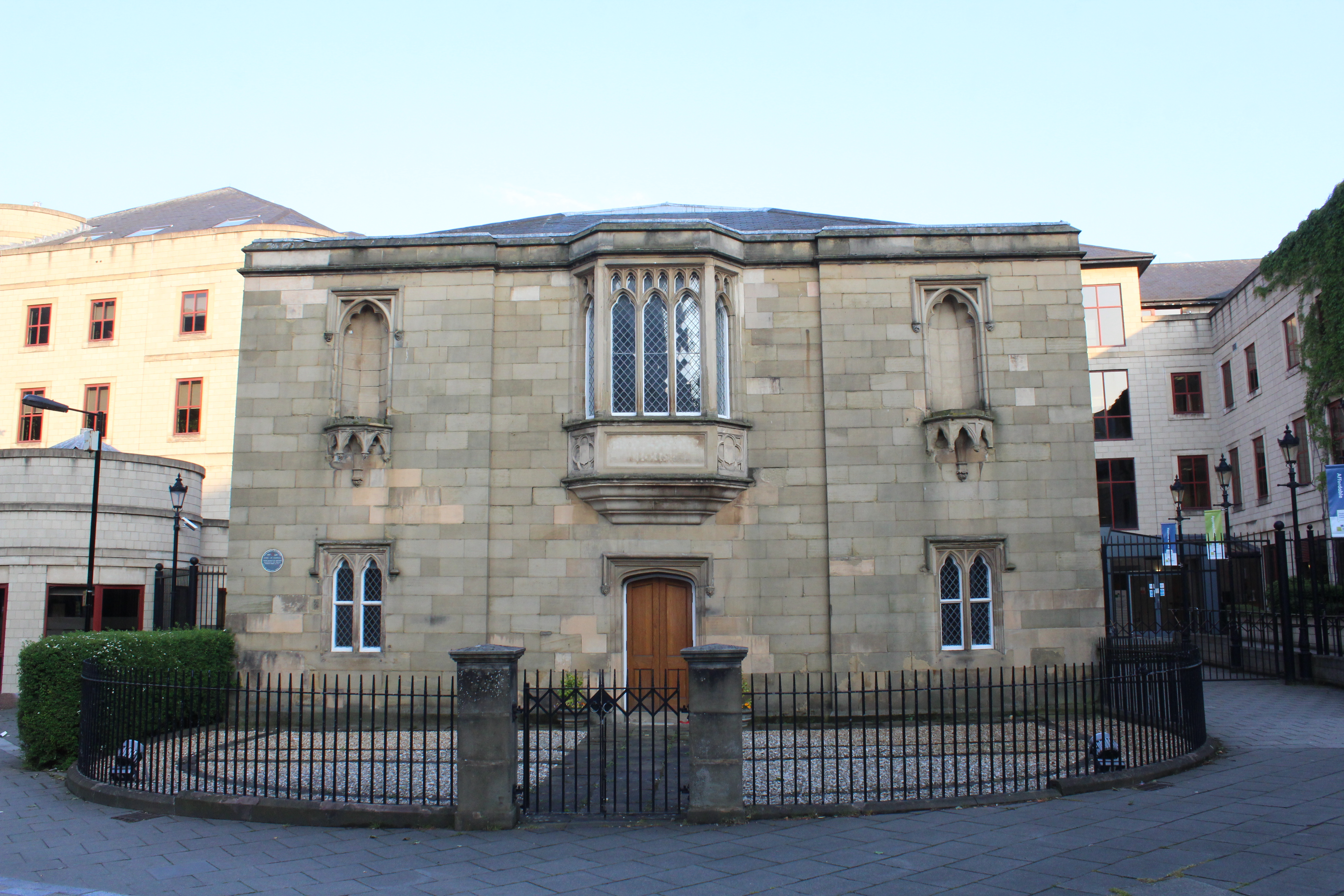 Lying-In Hospital, Newcastle upon Tyne.